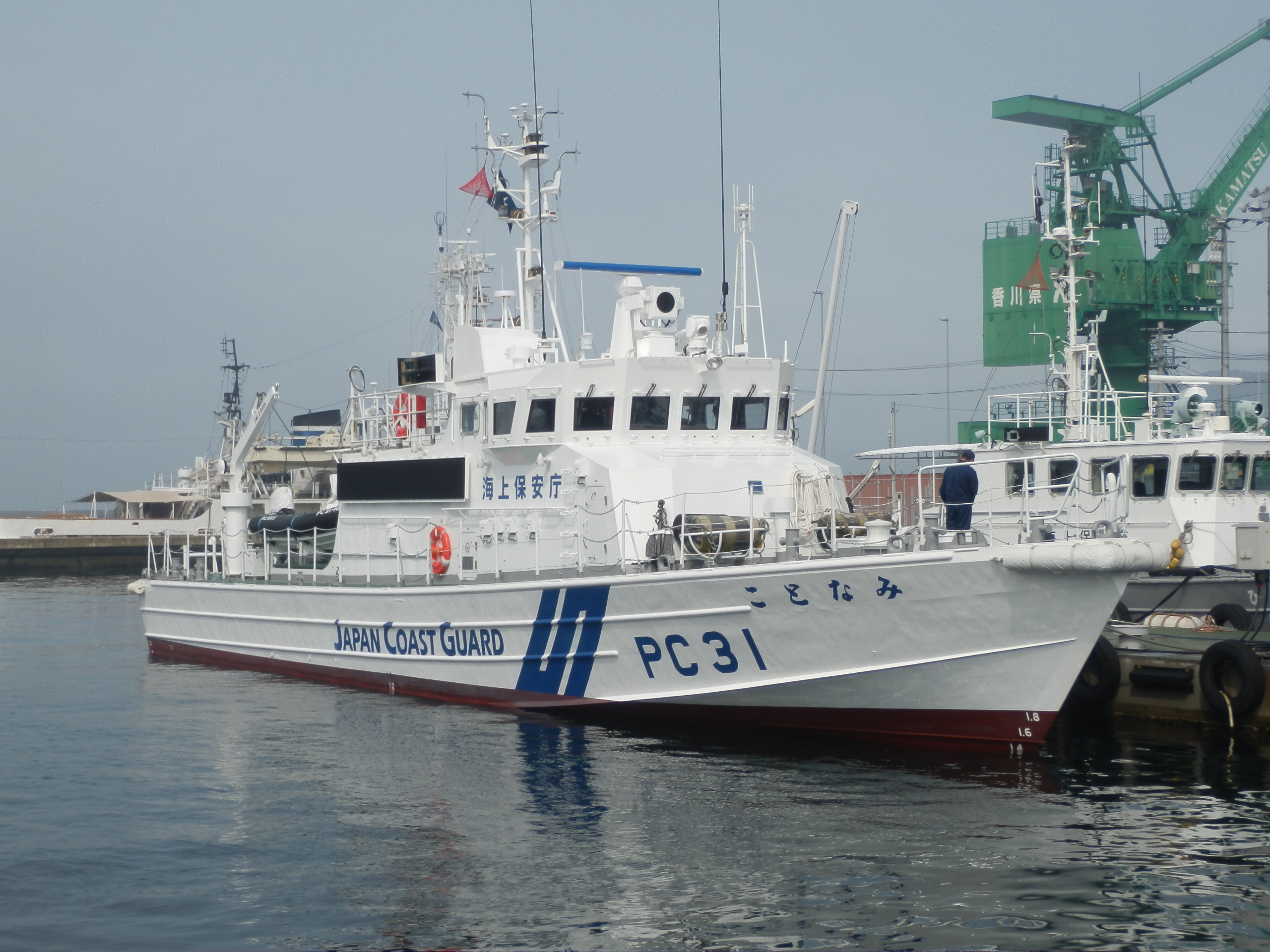 PC31 ことなみ